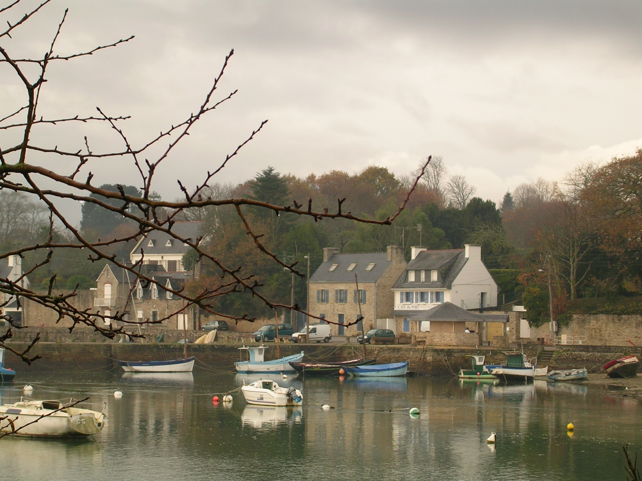 Le charme et l'authenticité d'un village breton : La Forêt-Fouesnant.